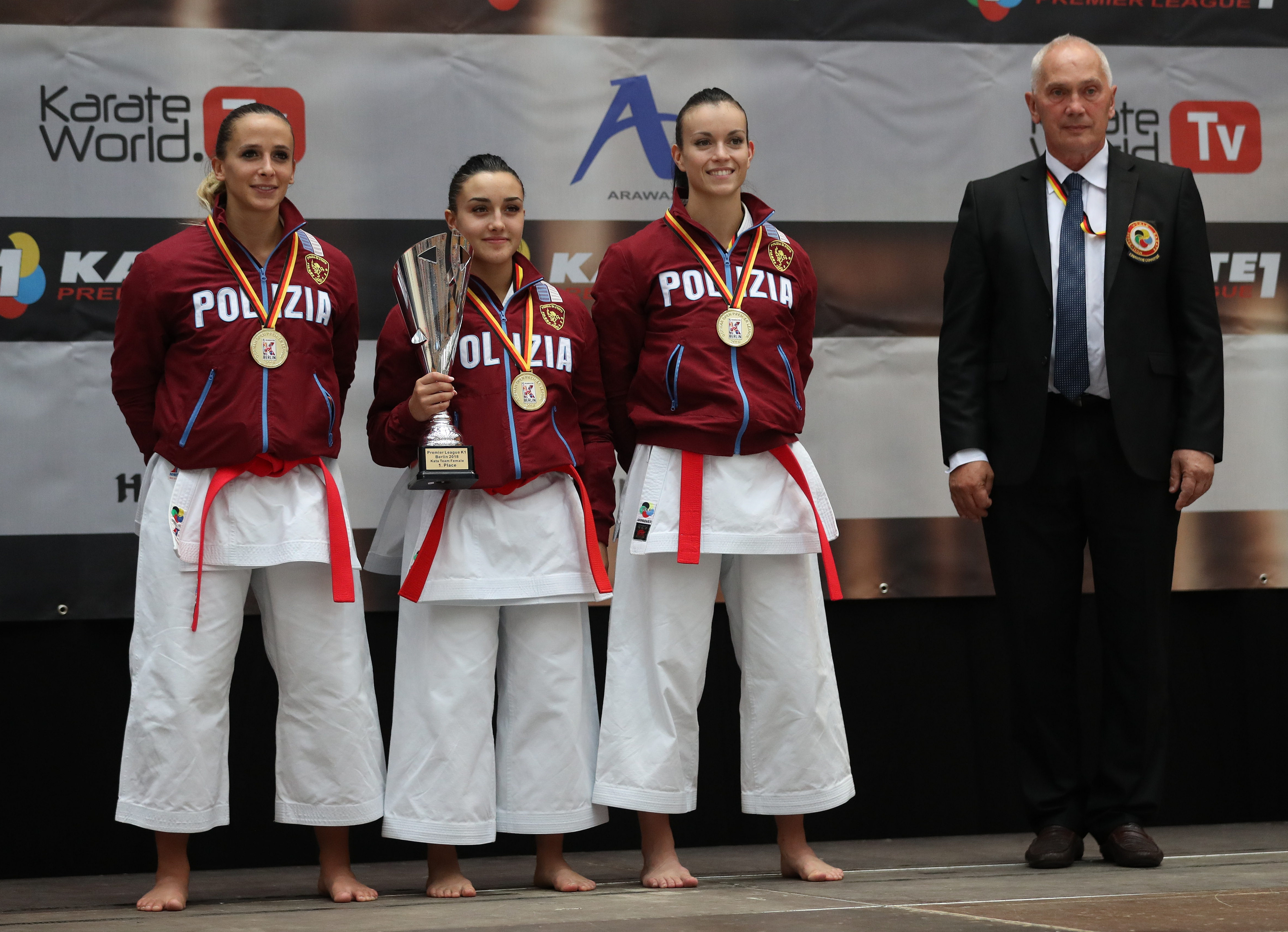 Ehrung der Siegerinnen und Sieger am 16. September 2018 in der Karate1 Premier League Berlin 2018.